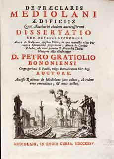 Pietro GRAZIOLI , 1700-1753, De praeclaris Mediolani aedificiis... Mediolani [Milano]: in Regia Curia, 1735.